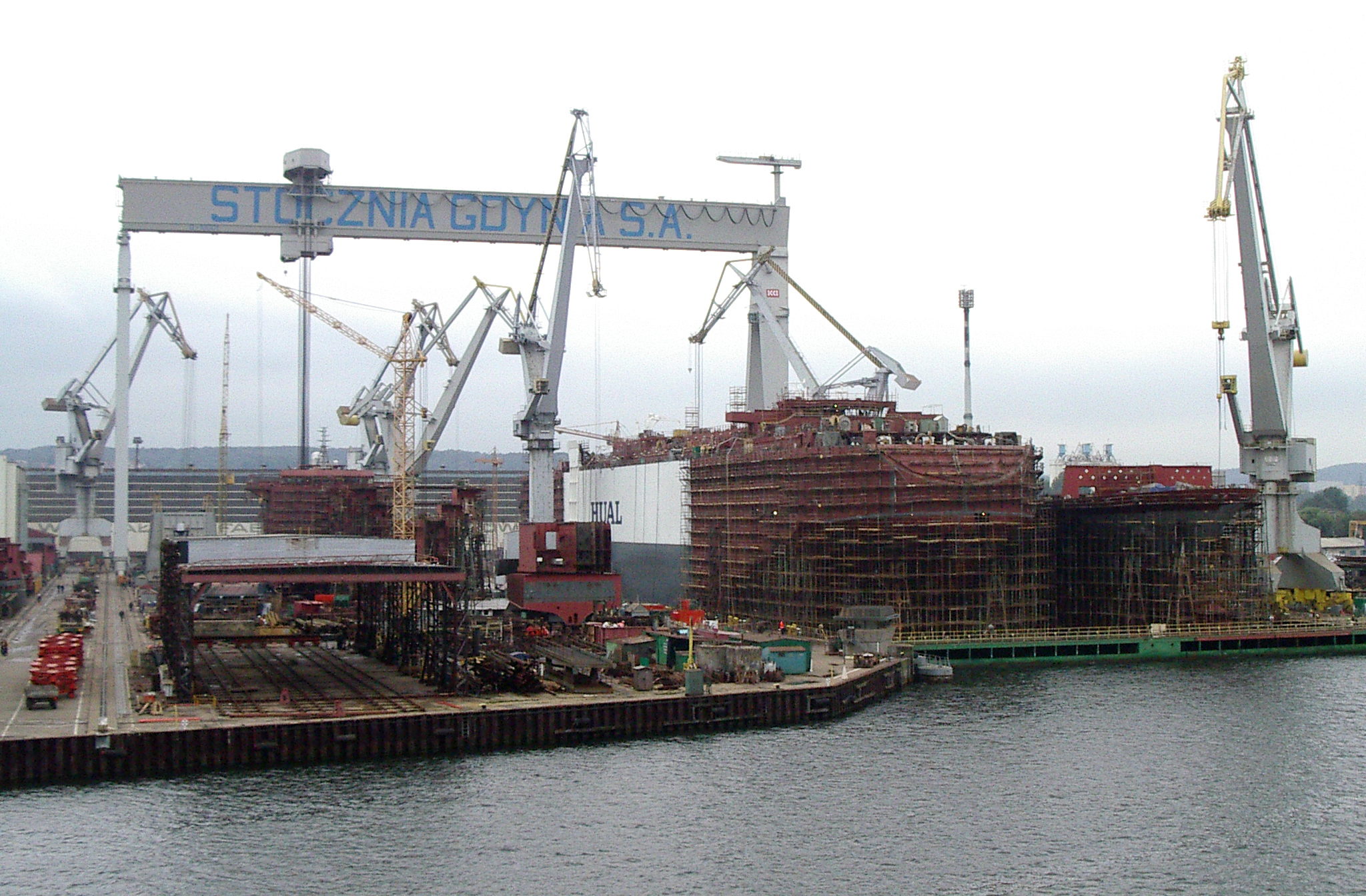 własne zdjęcie: Stocznia Gdynia Autor: Ssawka Grafika udostępniona na licencji GFDL